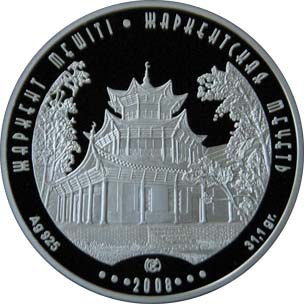 Памятная монета Республики Казахстан «Жаркентская мечеть» из серии «Соборы и мечети Казахстана» - 500 тенге - серебро - реверс